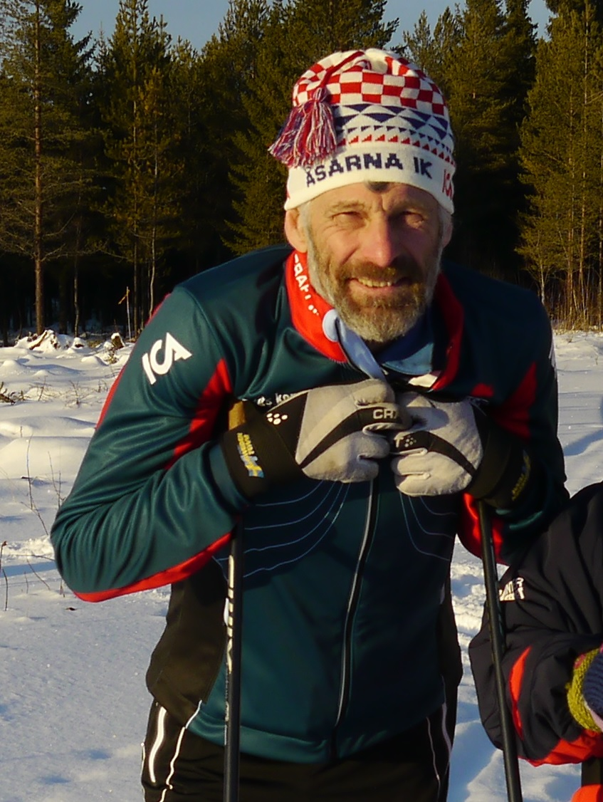 Skidlegenden Thomas Wassberg.